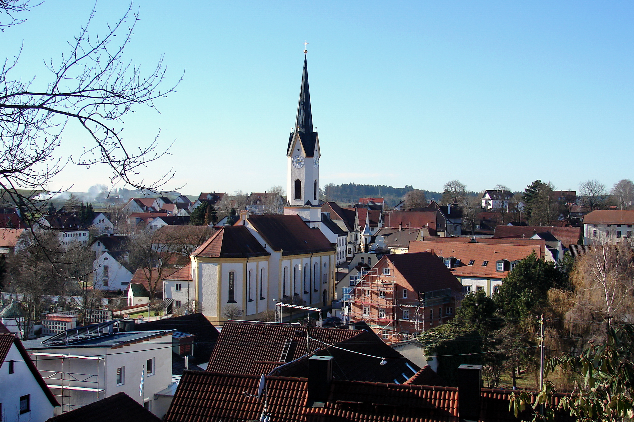 Nandlstadt ist ein Markt im oberbayerischen Landkreis Freising und gilt als ältester Hopfenanbauort der Welt.